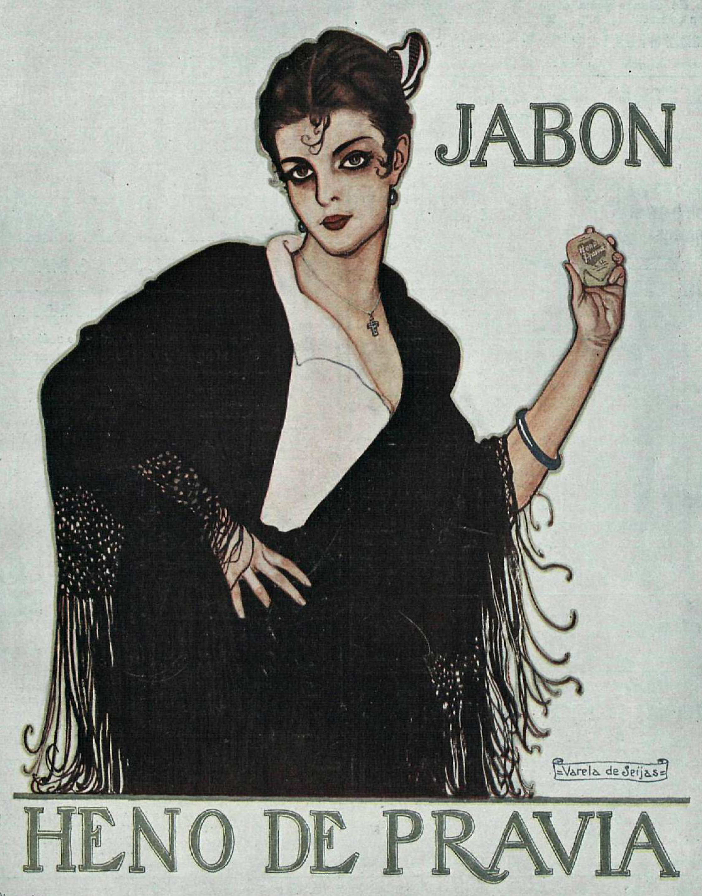 Anuncio de Heno de Pravia en la revista española La Esfera.